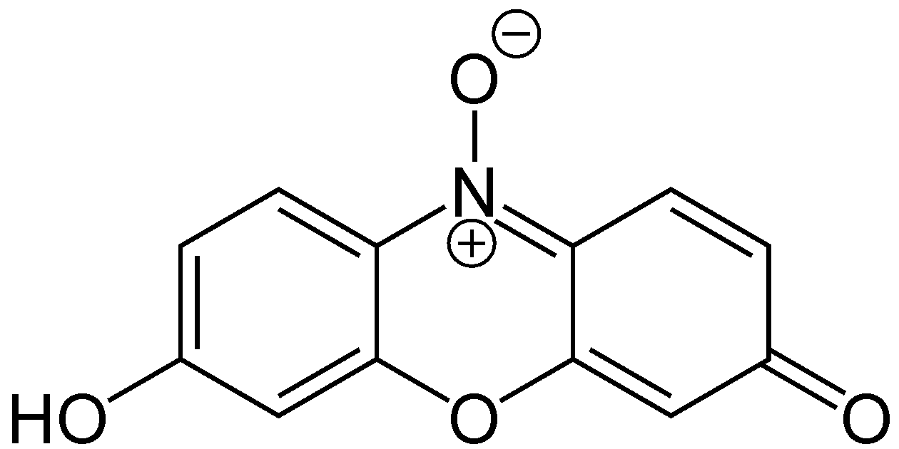 Strukturformel von Resazurin, überarbeitet von Yikrazuul!